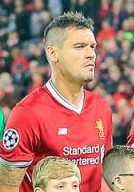 Liverpool FC